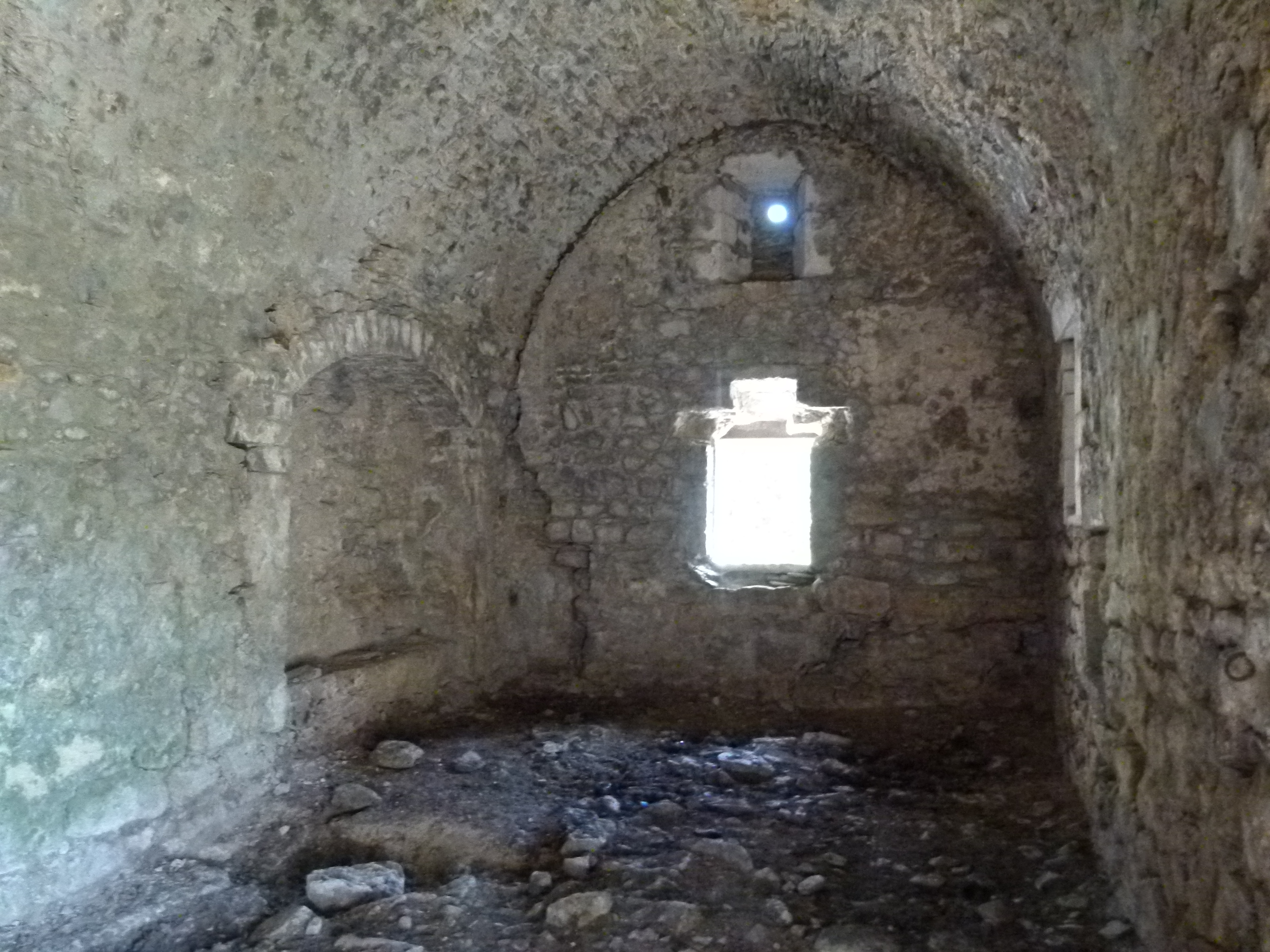 Capella de Santa Margarida i Hospici de Santa Maria de Colldares (Prats de Molló i la Presta)